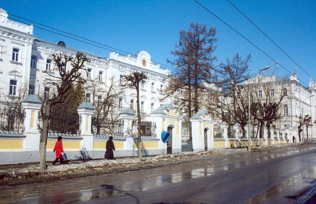 Рязанский Государственный Университет